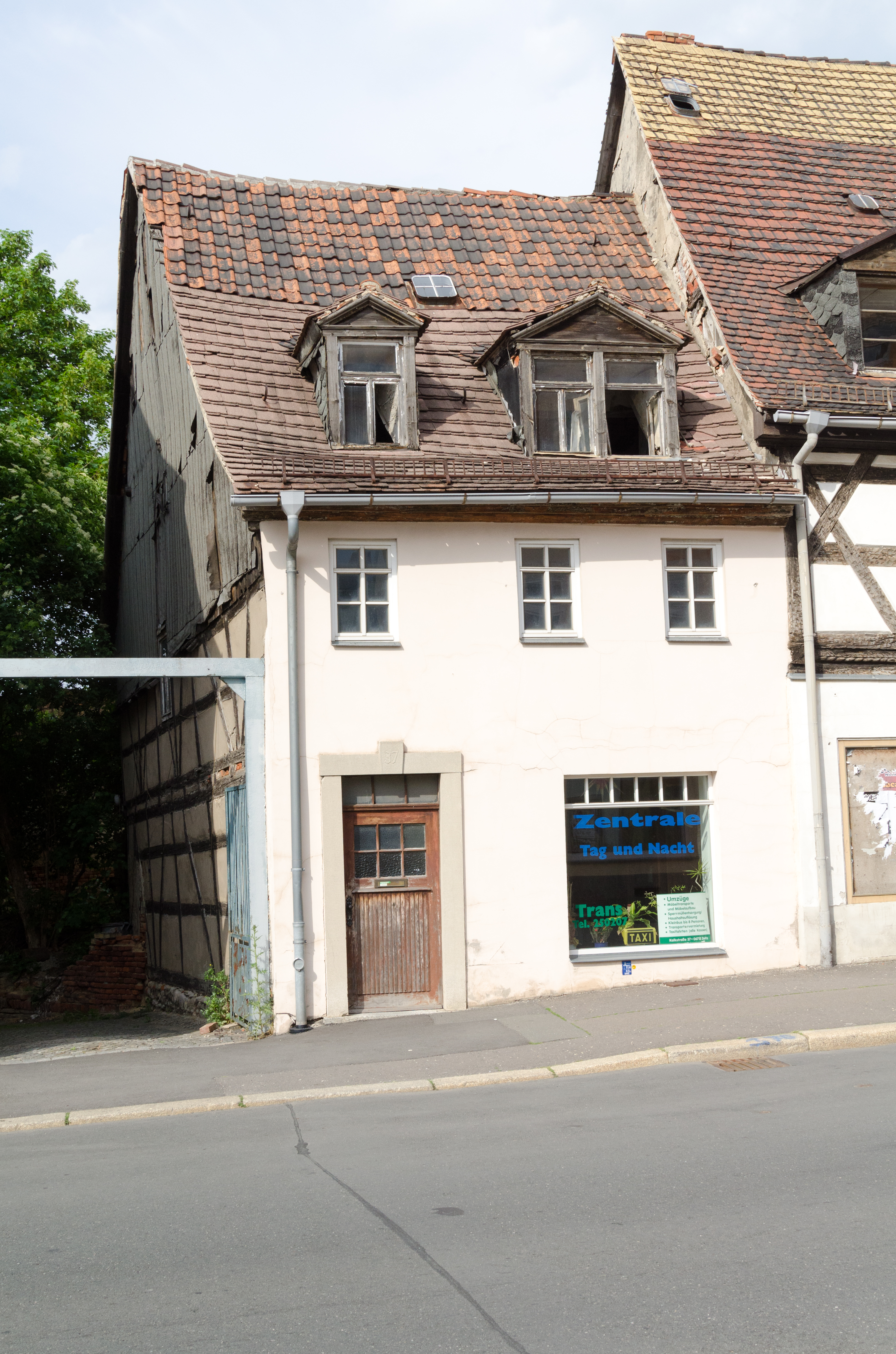 Zeitz, Kalkstraße 37